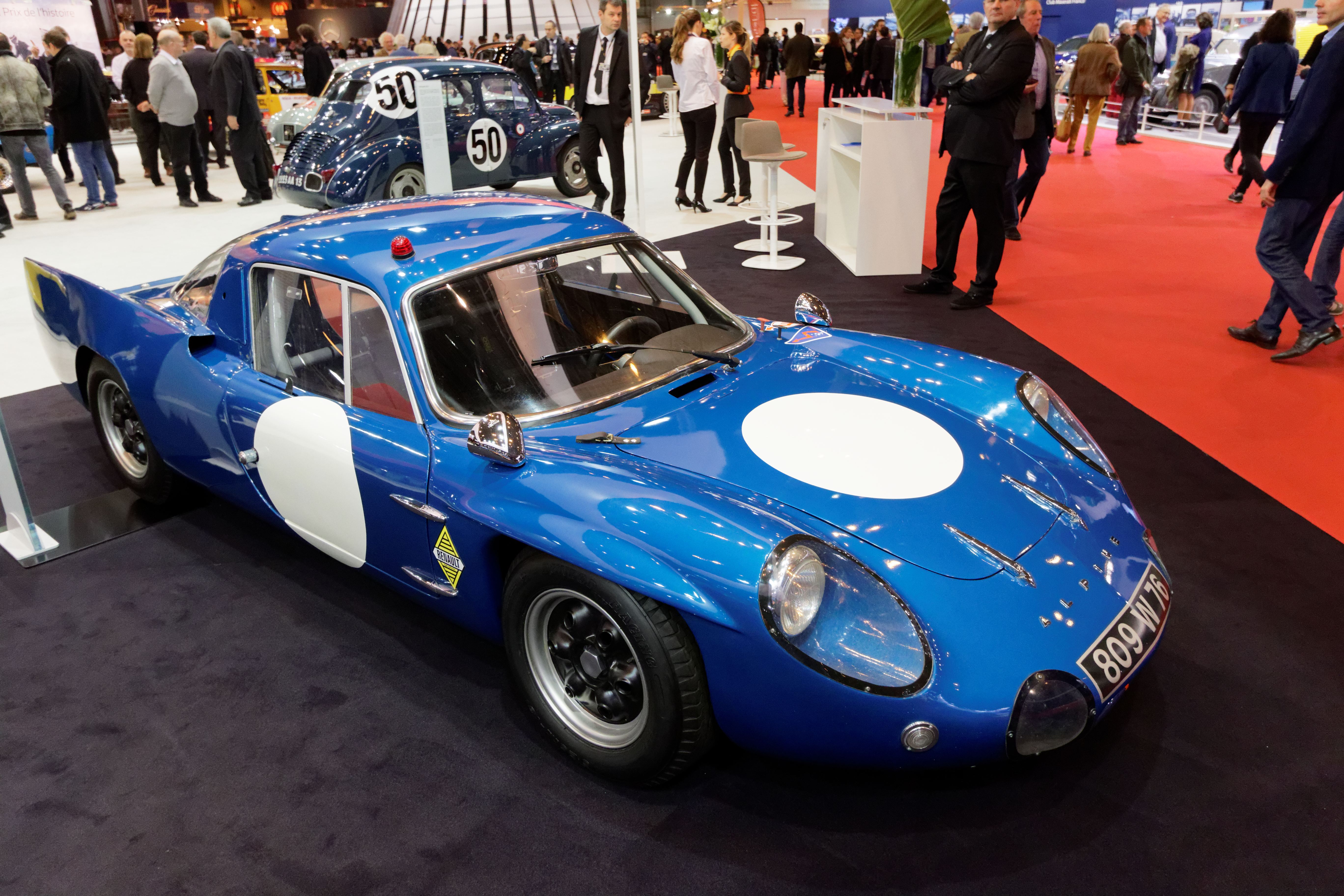 Une Alpine M65 de 1965 exposée lors du salon Rétromobile 2016.